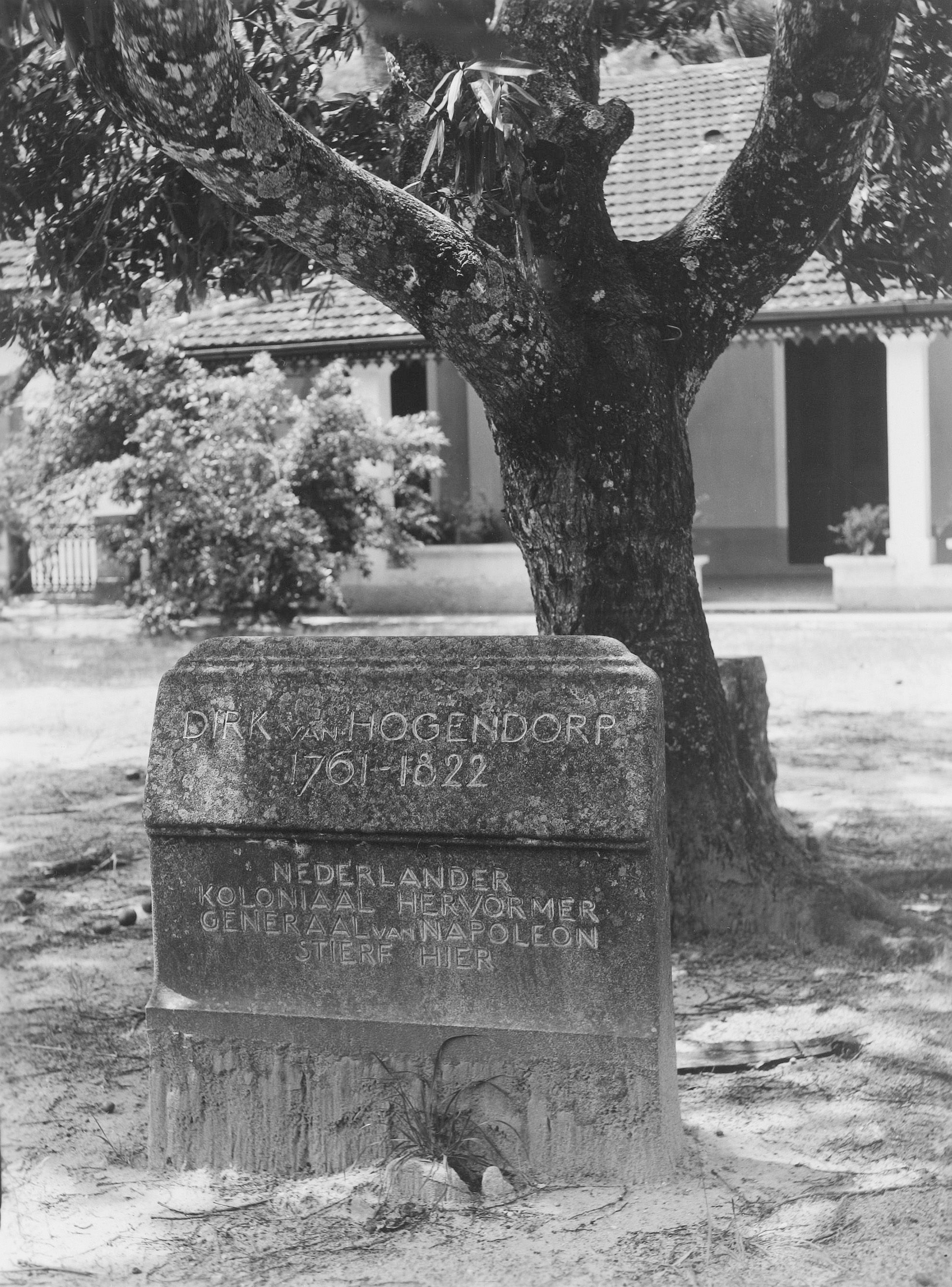 Monument ter nagedachtenis aan generaal Dirk van Hogendorp in de buurt van Rio de Janeiro 1937-04-20